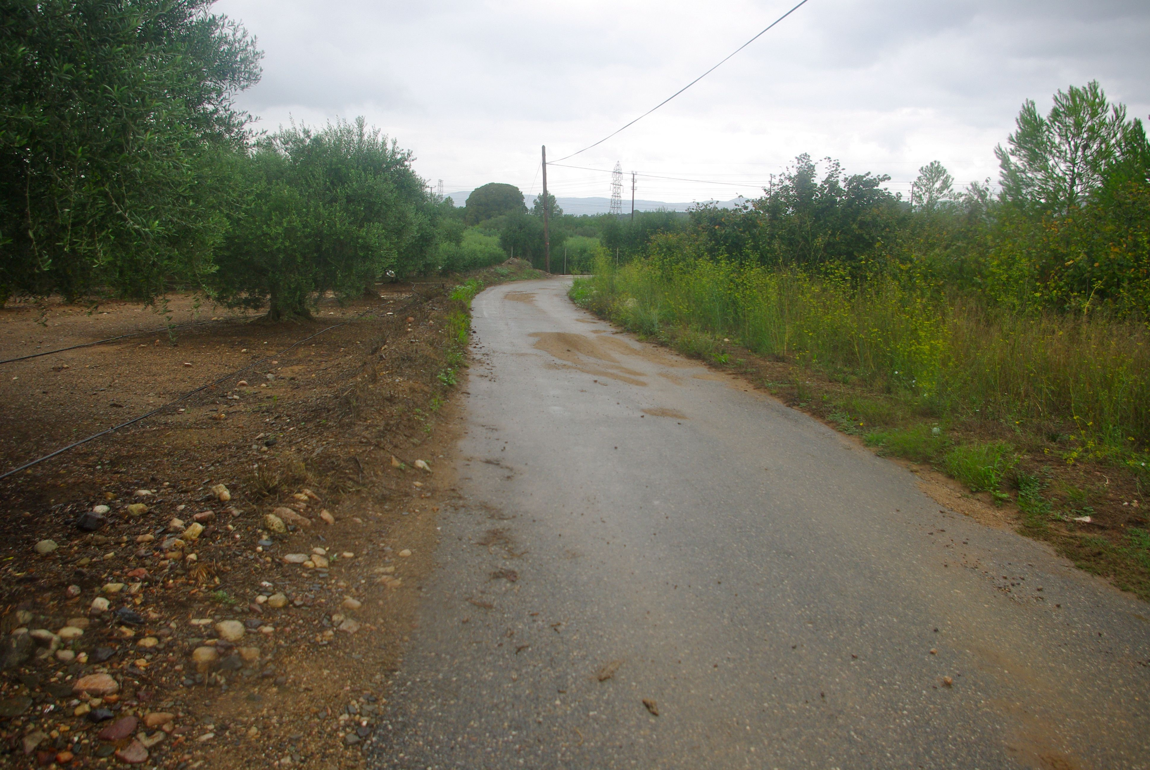 El camí del Mas de Gassot una mica més avall del Mas de la Victòria, al terme de Reus